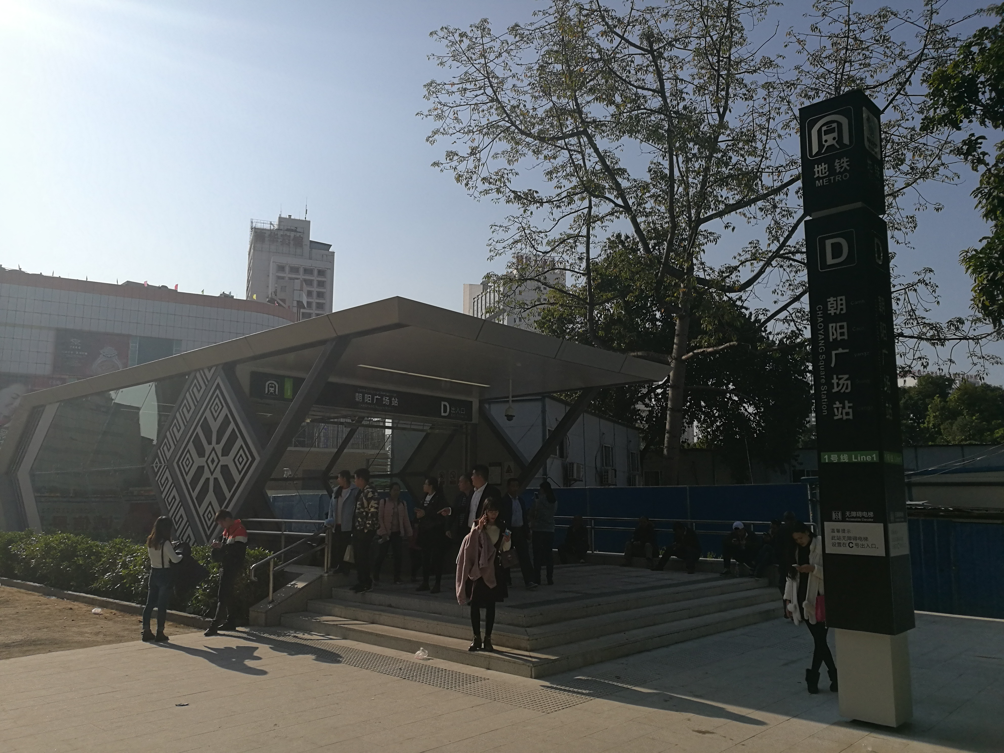 南宁轨道交通朝阳广场站